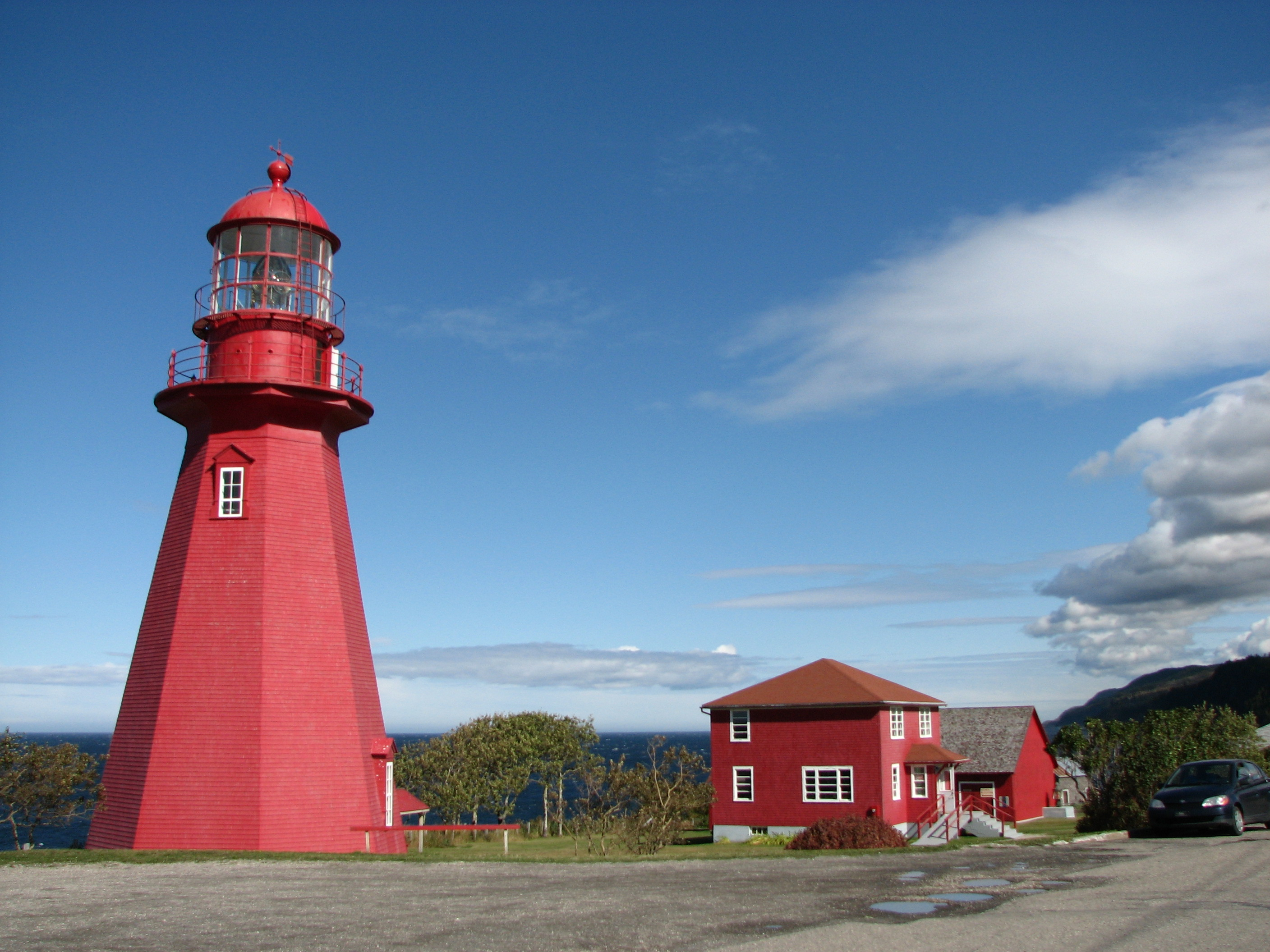 Phare de La Martre / La Martre lighthouse. Gaspésie, Québec